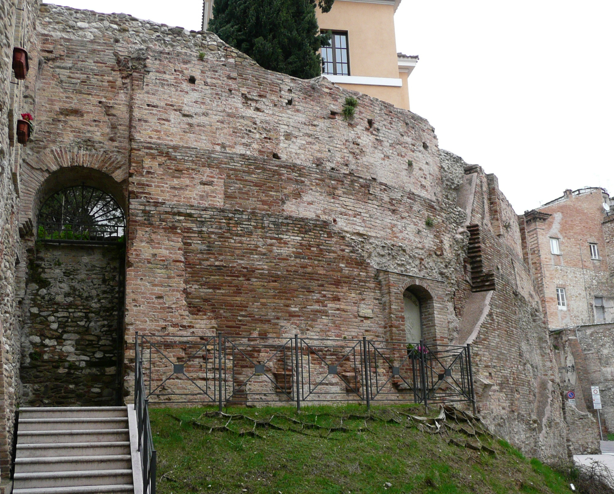 Resti dell'Anfiteatro romano di Teramo Categoria:Teramo